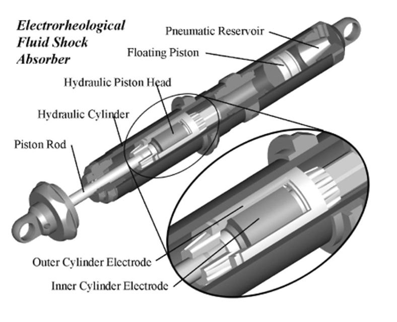 احزای مختلف کمک فنری که با استفاده از یک سیال الکترورئولوژیک کار میکند